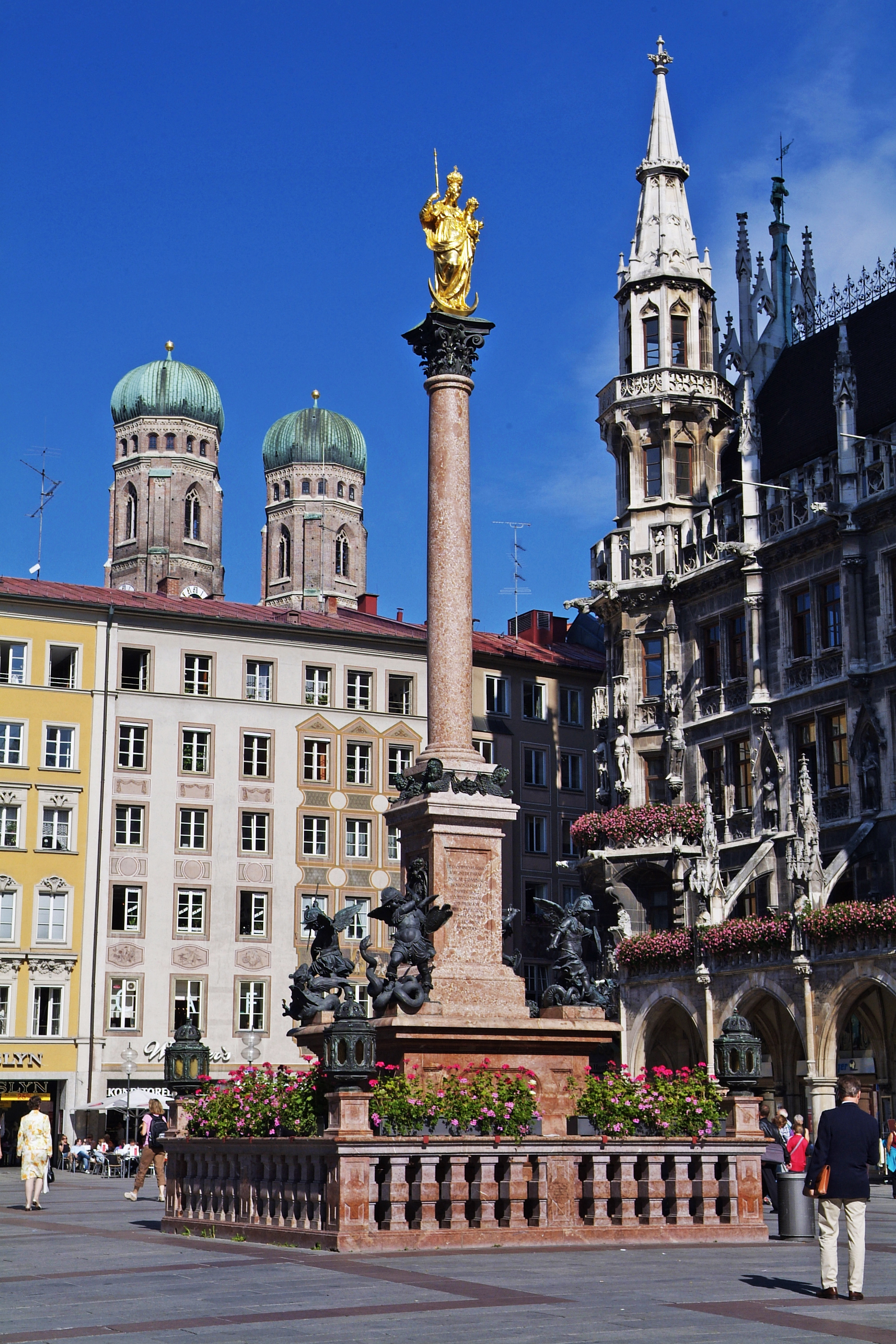 Marienstatue